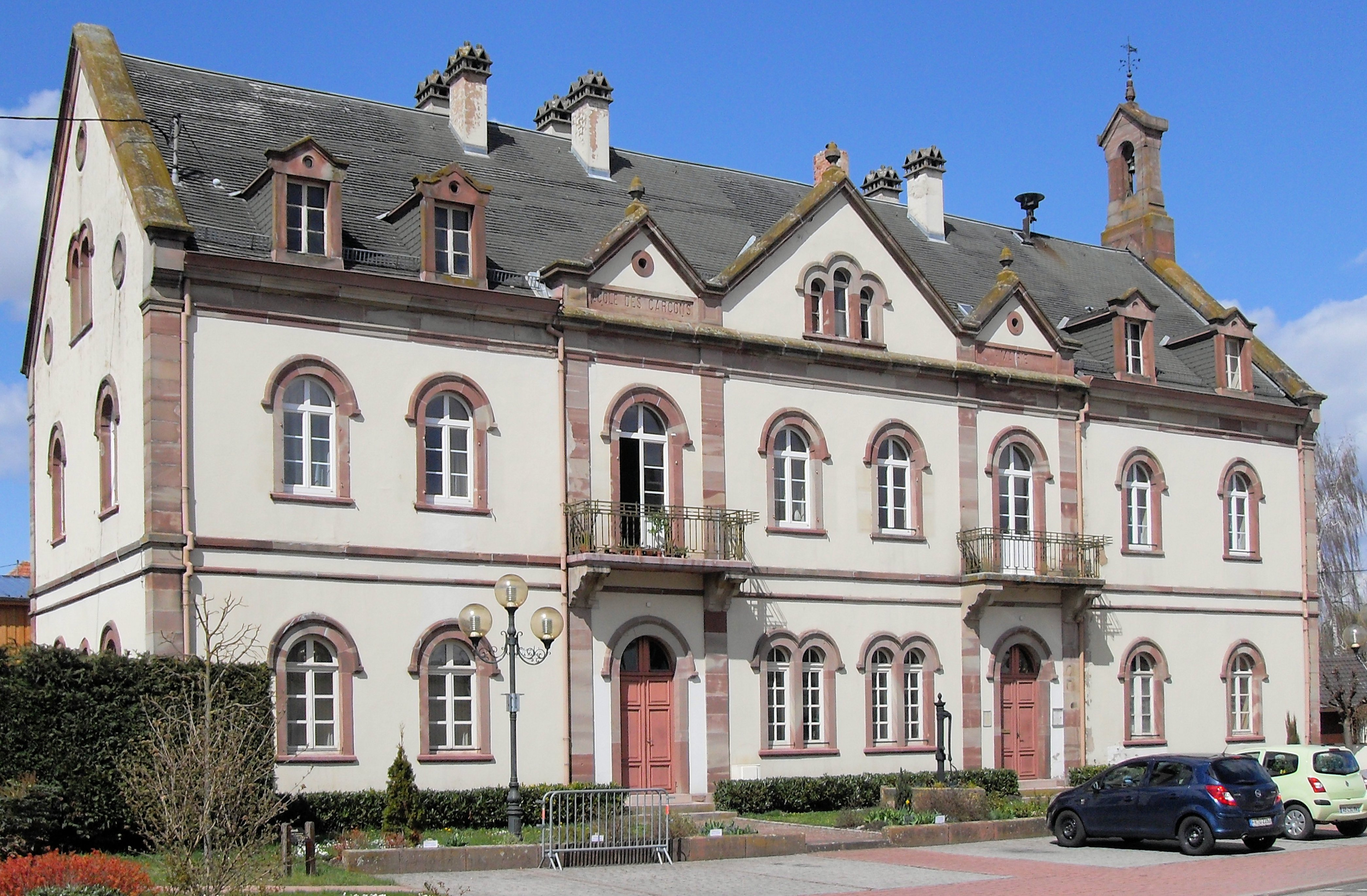 La mairie-école de Sermersheim